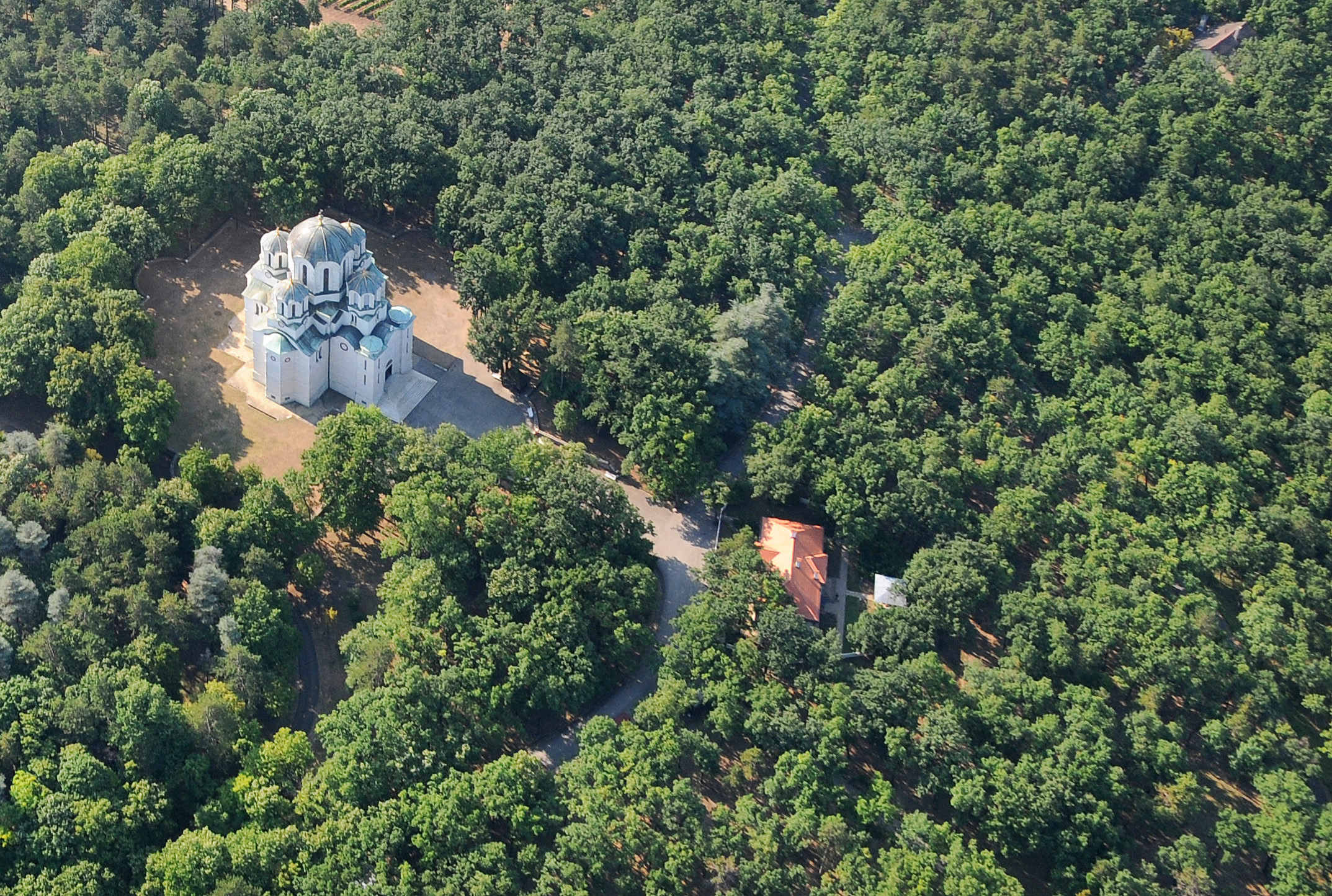 Srpskohrvatski / српскохрватски: Memorijalni prirodni spomenik Park Oplenac